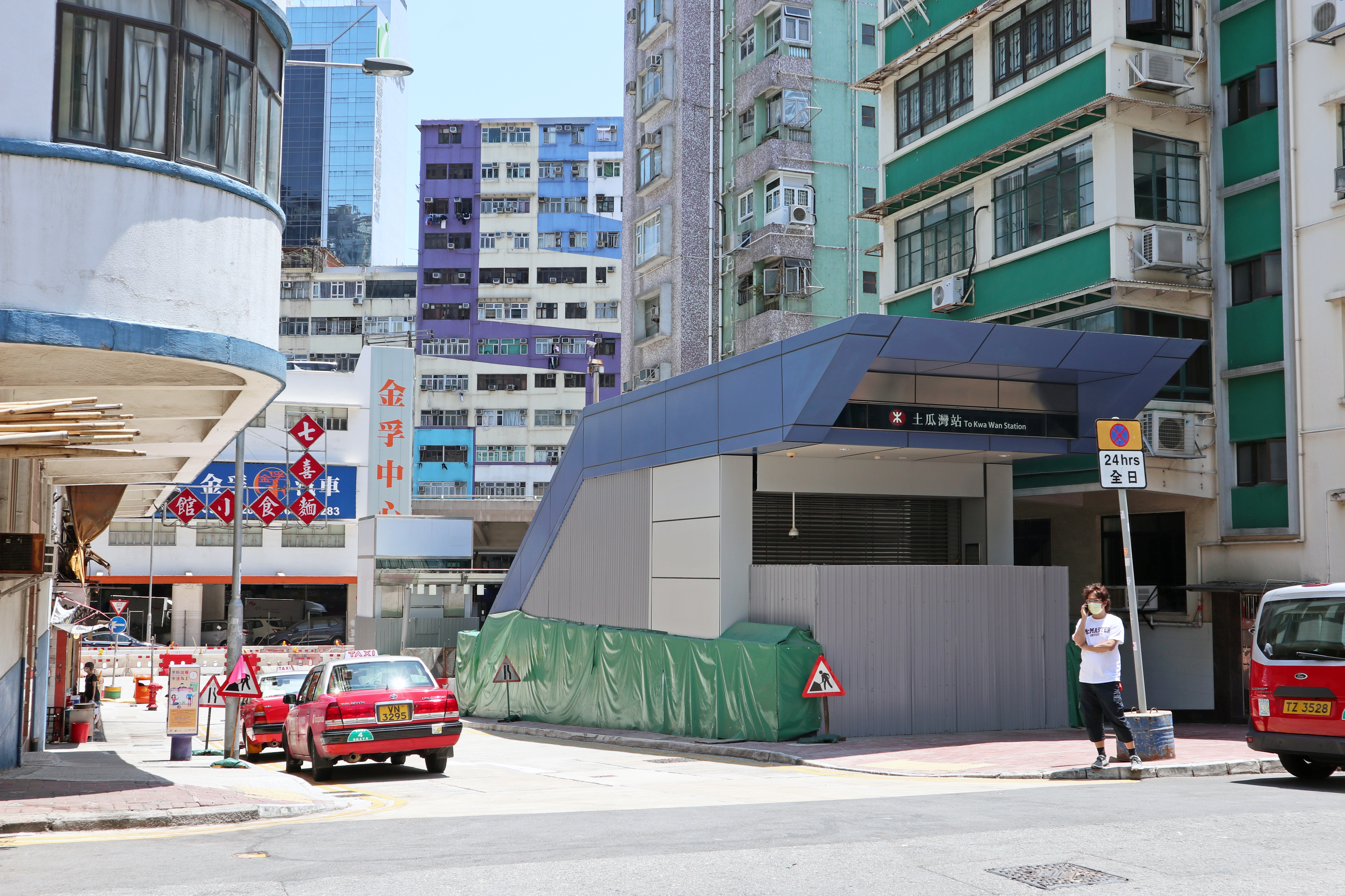 港鐵土瓜灣站C出入口外觀